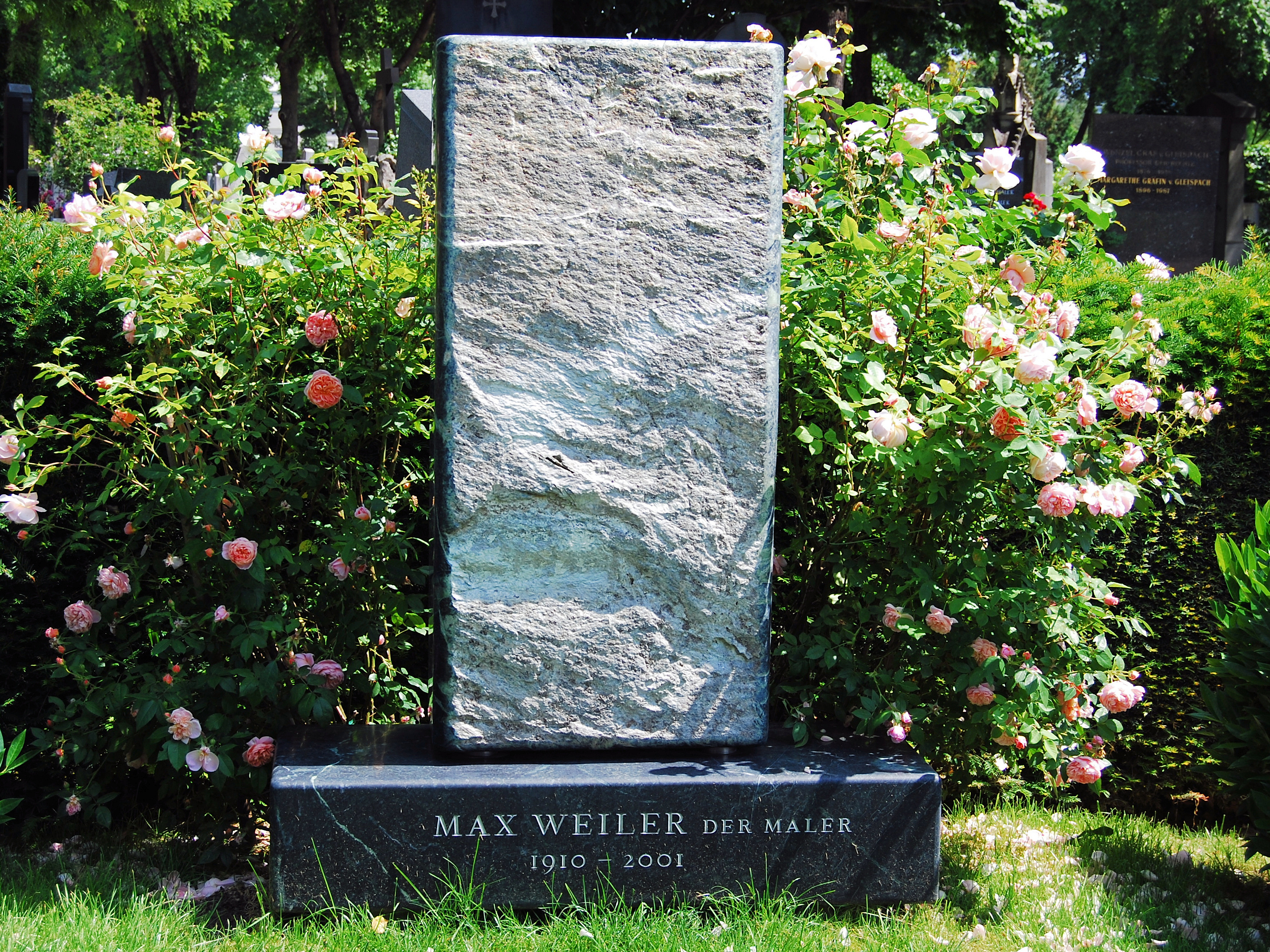 Grab des Malers Max Weiler